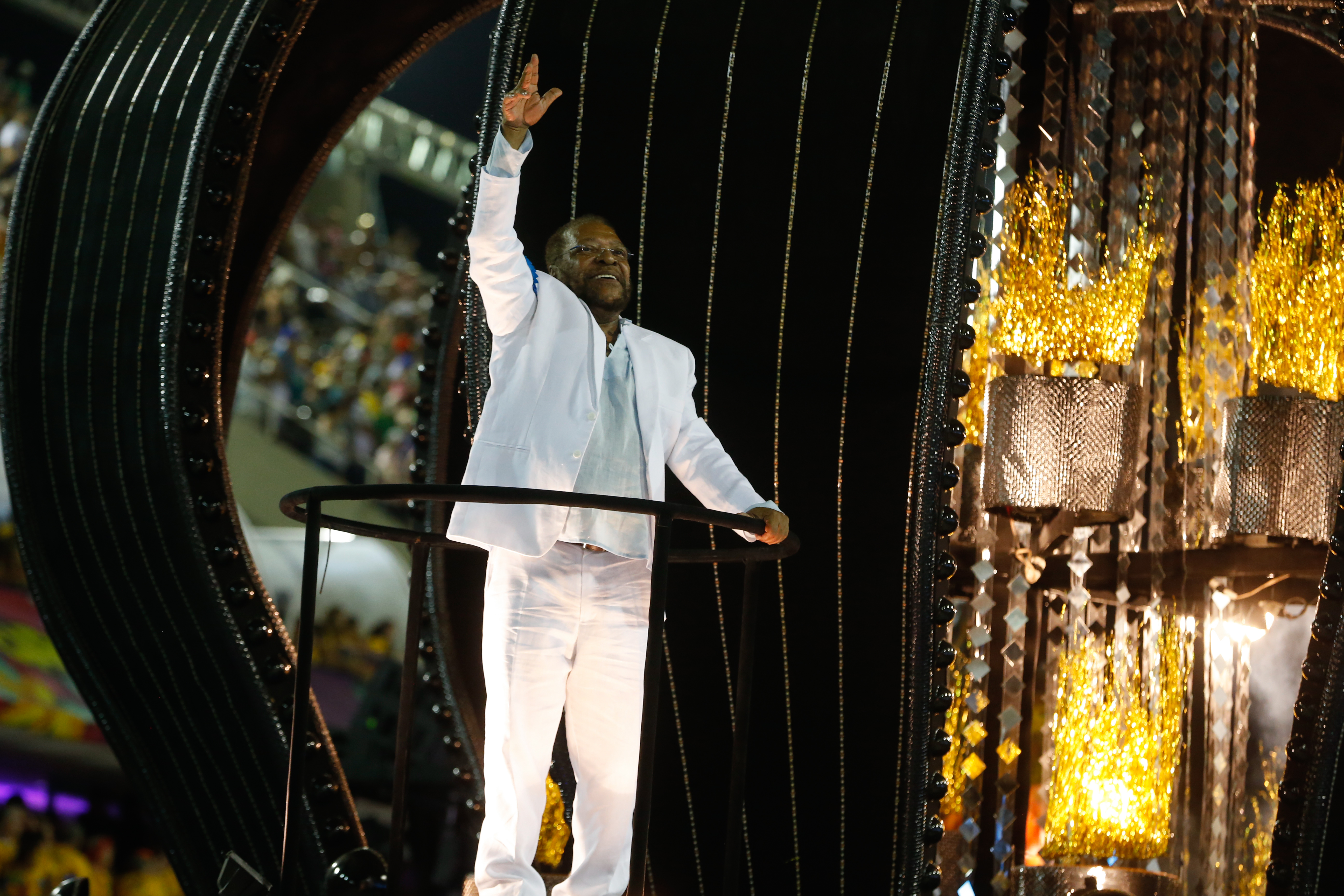 Rio de Janeiro - Desfile da Escola de Samba Vila Isabel no primeiro dia de apresentações do Grupo Especial das Escolas de Samba do Rio, na Sapucaí (Tânia Rêgo/Agência Brasil)